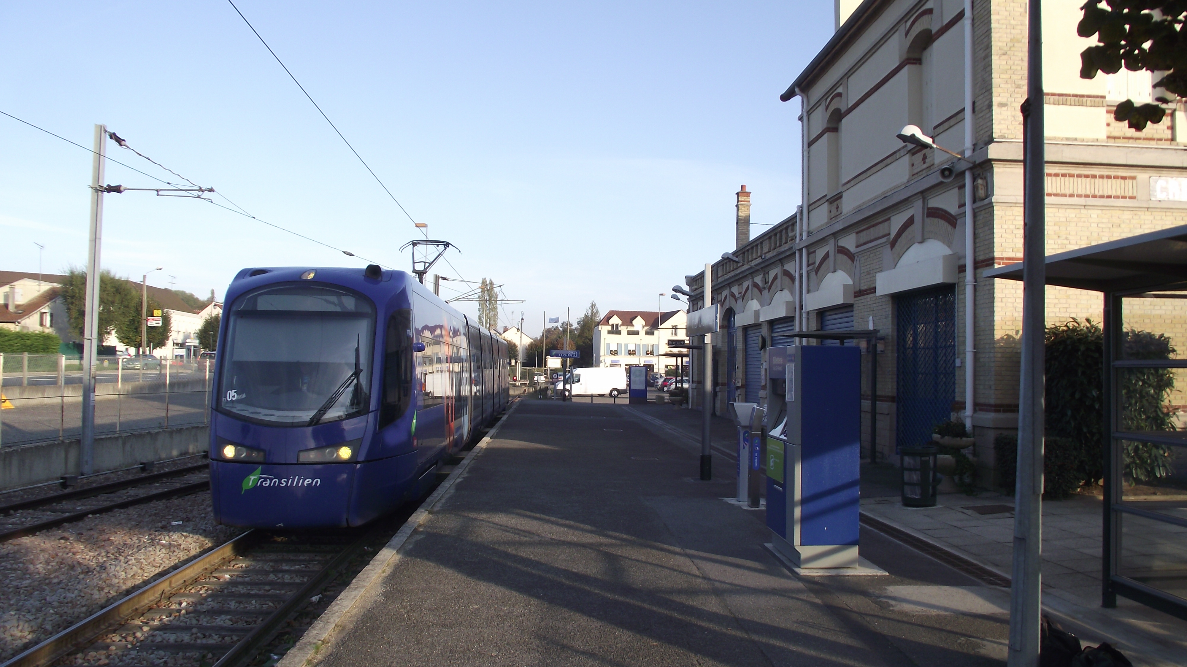 Tram-trein bij het eindpunt van Crécy-la-Chapelle